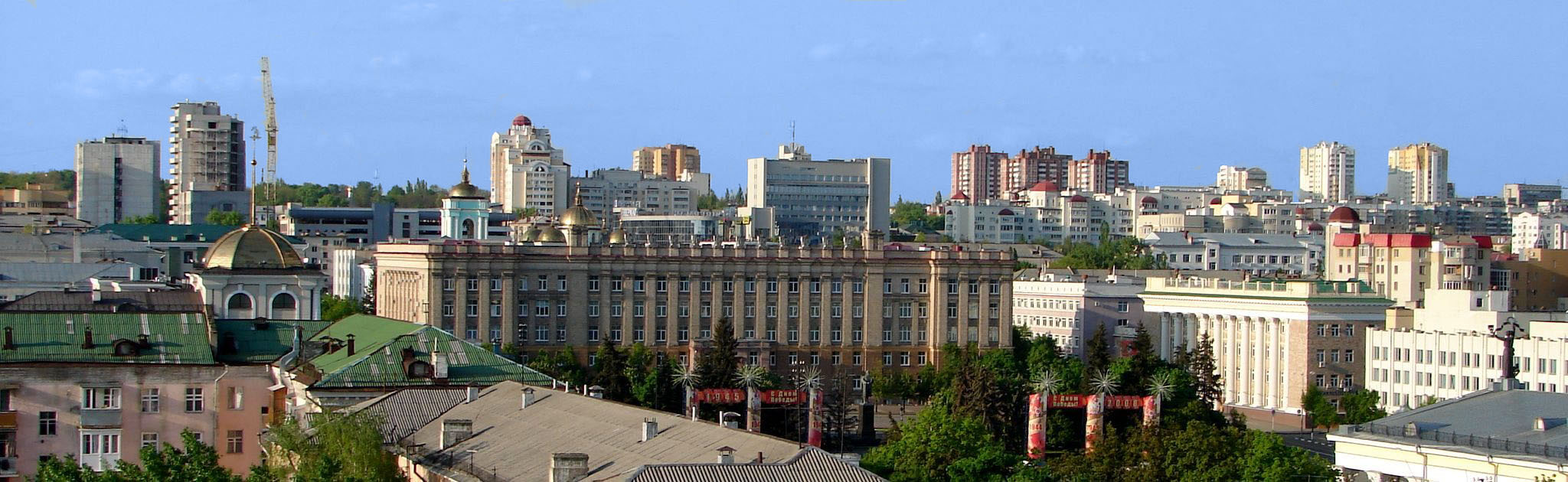 Вид на центральную и северную чать города Белгорода